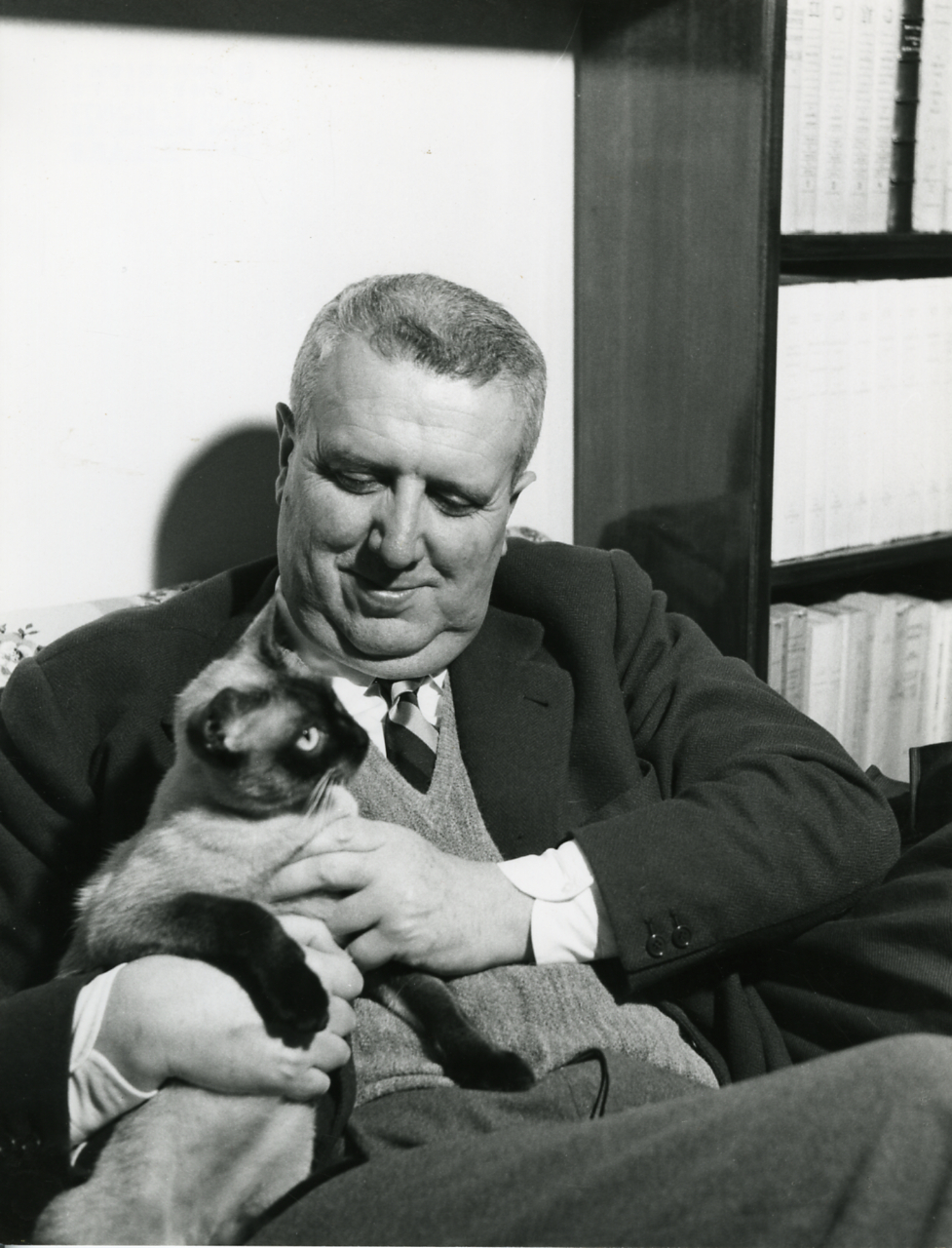 Servizio fotografico : Italia, 1954 / Paolo Monti. - Stampe: 2 : Positivo b/n, gelatina bromuro d'argento/ carta, 24x30. - ((Al verso delle stampe manoscritto: "Carlo Bo 1954". Sul coperchio della scatola manoscritto: "Ritratti Artisti".